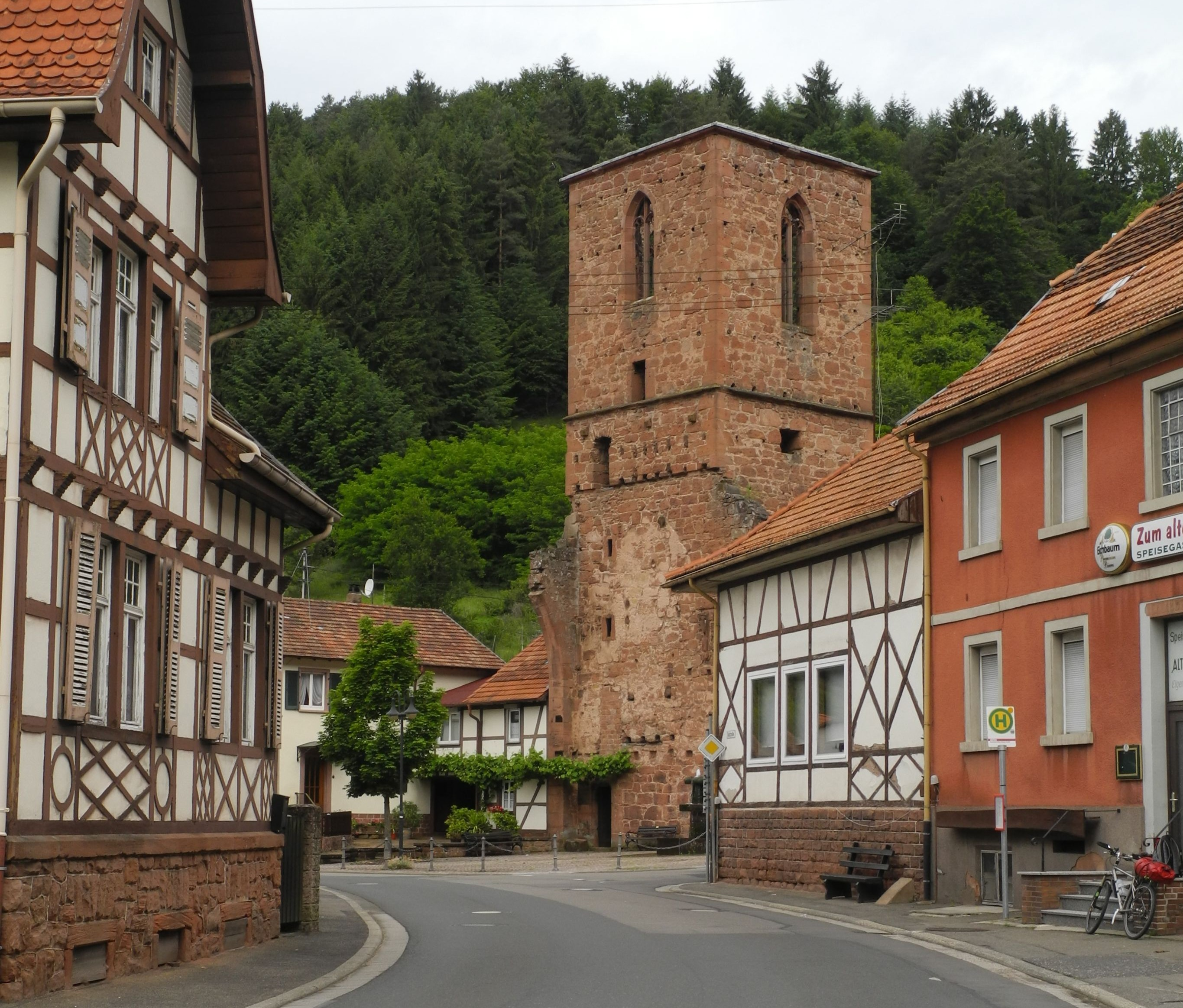 Elmstein - Alter Turm in Appenthal